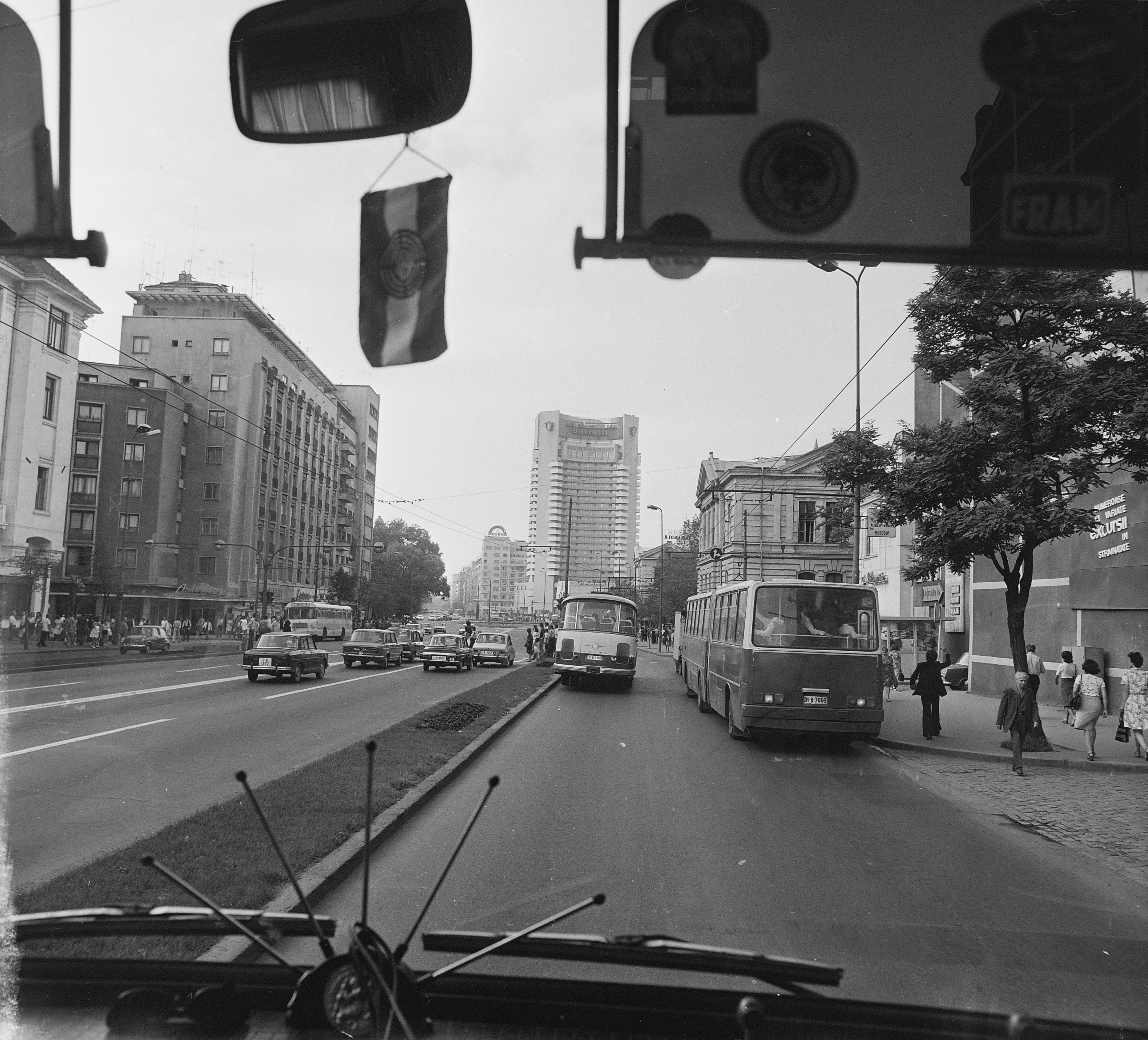 a Bulevardul I. C. Brătianu, háttérben a Hotel Intercontinental Bucharest. Location: Romania, Bucharest Tags: trolley bus, Ikarus-brand, Hungarian brand, automobile, high-rise building, street view Title: a Bulevardul I. C. Brătianu, háttérben a Hotel Intercontinental Bucharest.